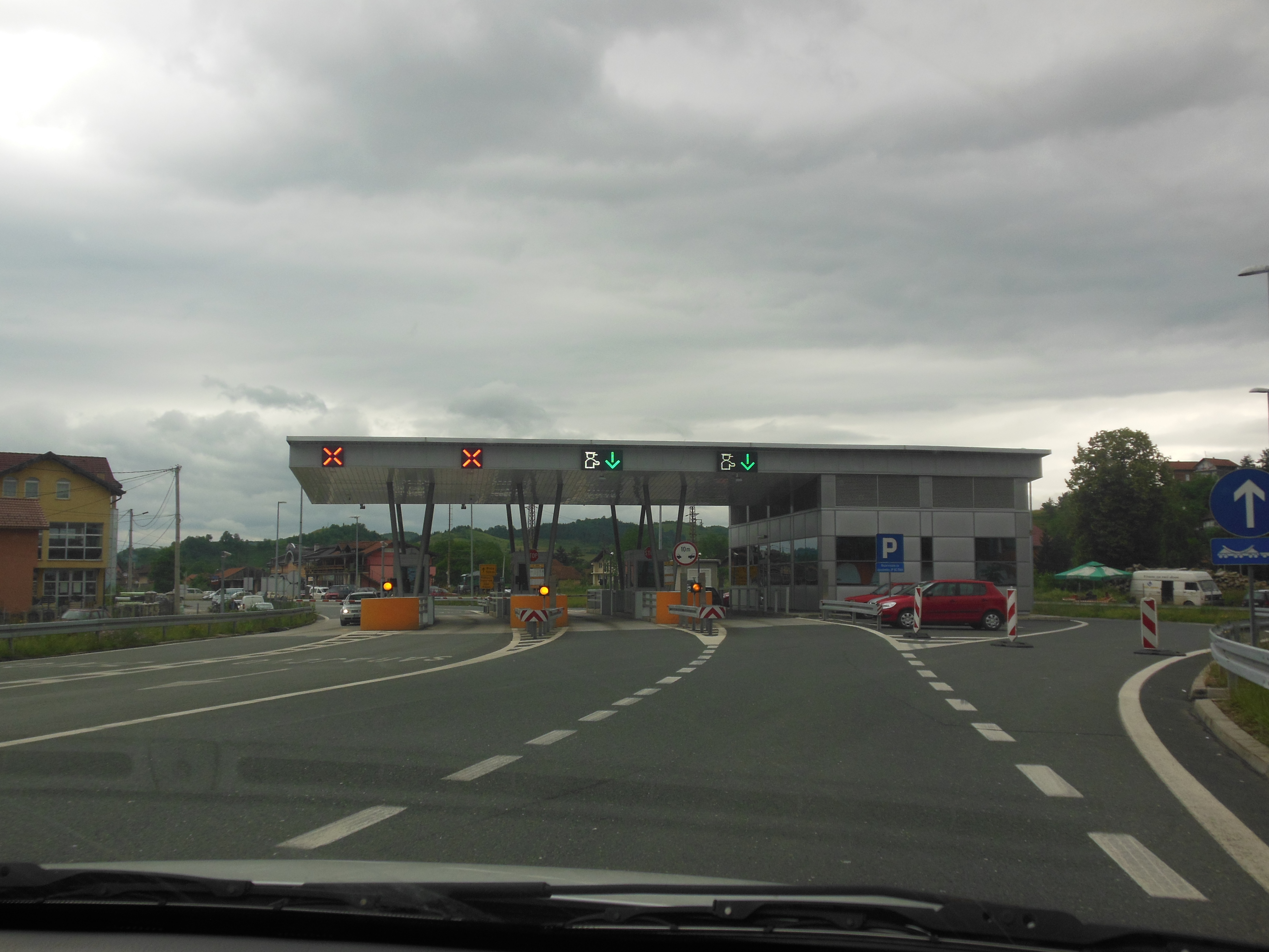 Bosnian A1